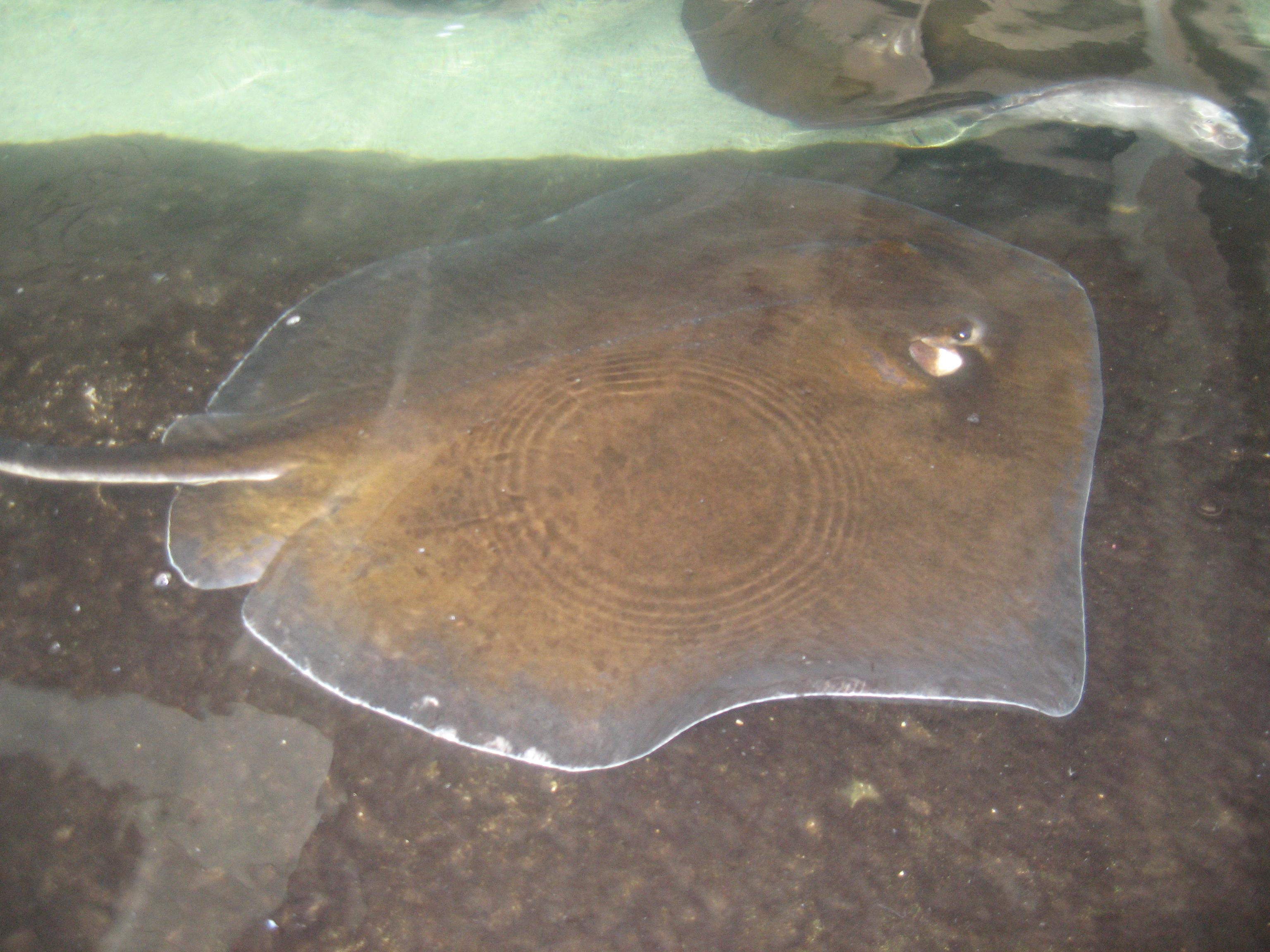 Bluntnose stingray (Dasyatis say) at Seaworld, Orlando, Florida